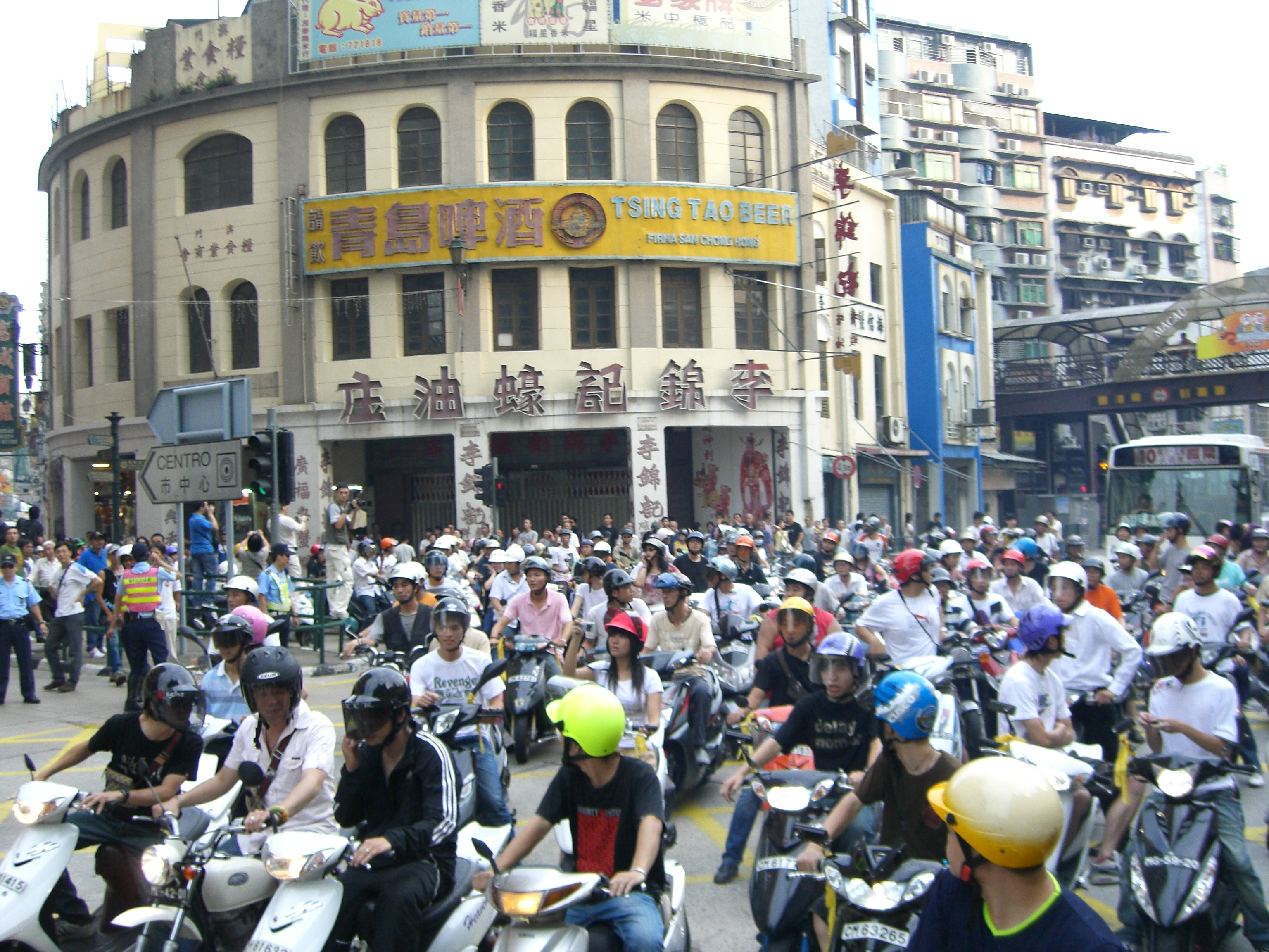 Macau 9.30 Parade